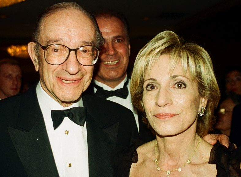 Wash D.C. 2000